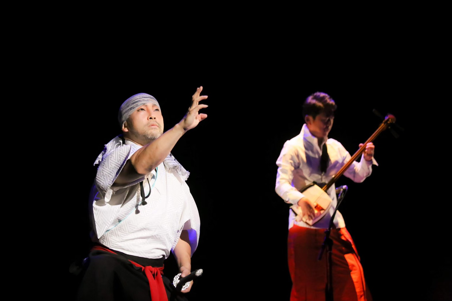 コラボ写真